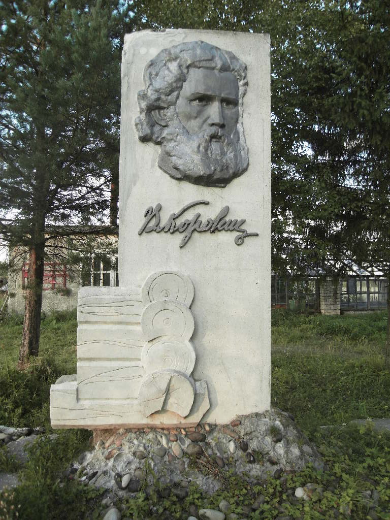 Korolenko's monument in Beryozovskiye Pochinki.